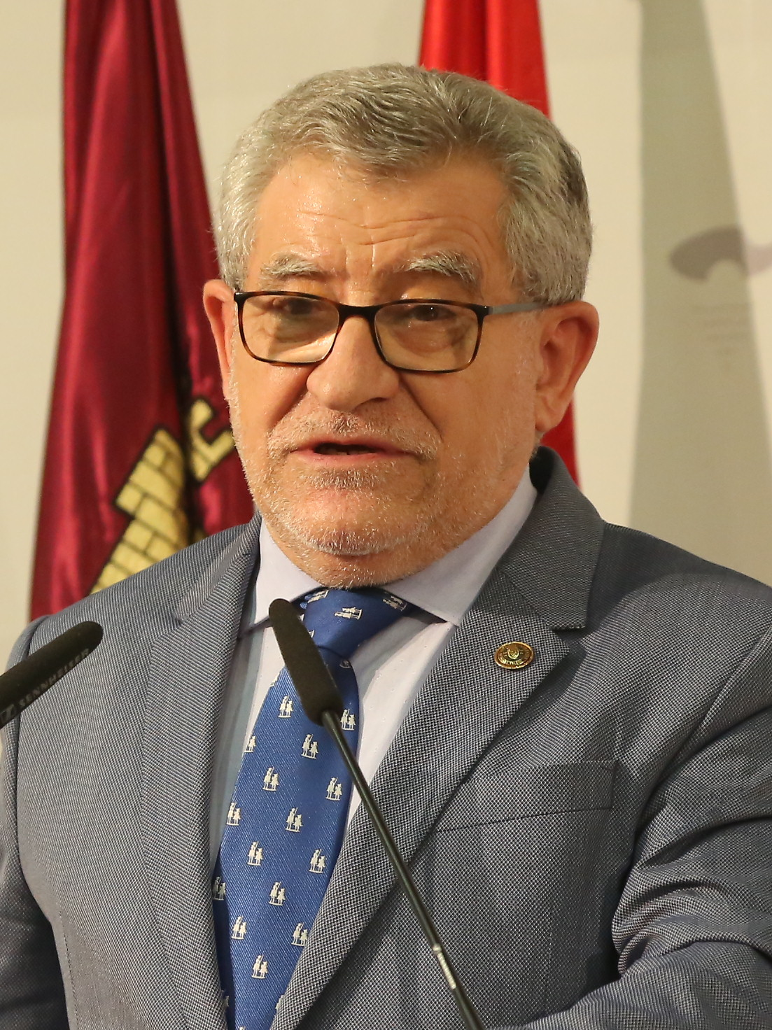 Toledo, 26 de octubre de 2018.- El consejero de Educación, Cultura y Deportes, Ángel Felpeto, preside el acto de entrega de los Premios Extraordinarios de ESO, Bachillerato y Enseñanzas Artísticas 2017-2018, en la Sala Buero Vallejo de la Consejería de Educación. (Foto: Álvaro Ruiz // JCCM)